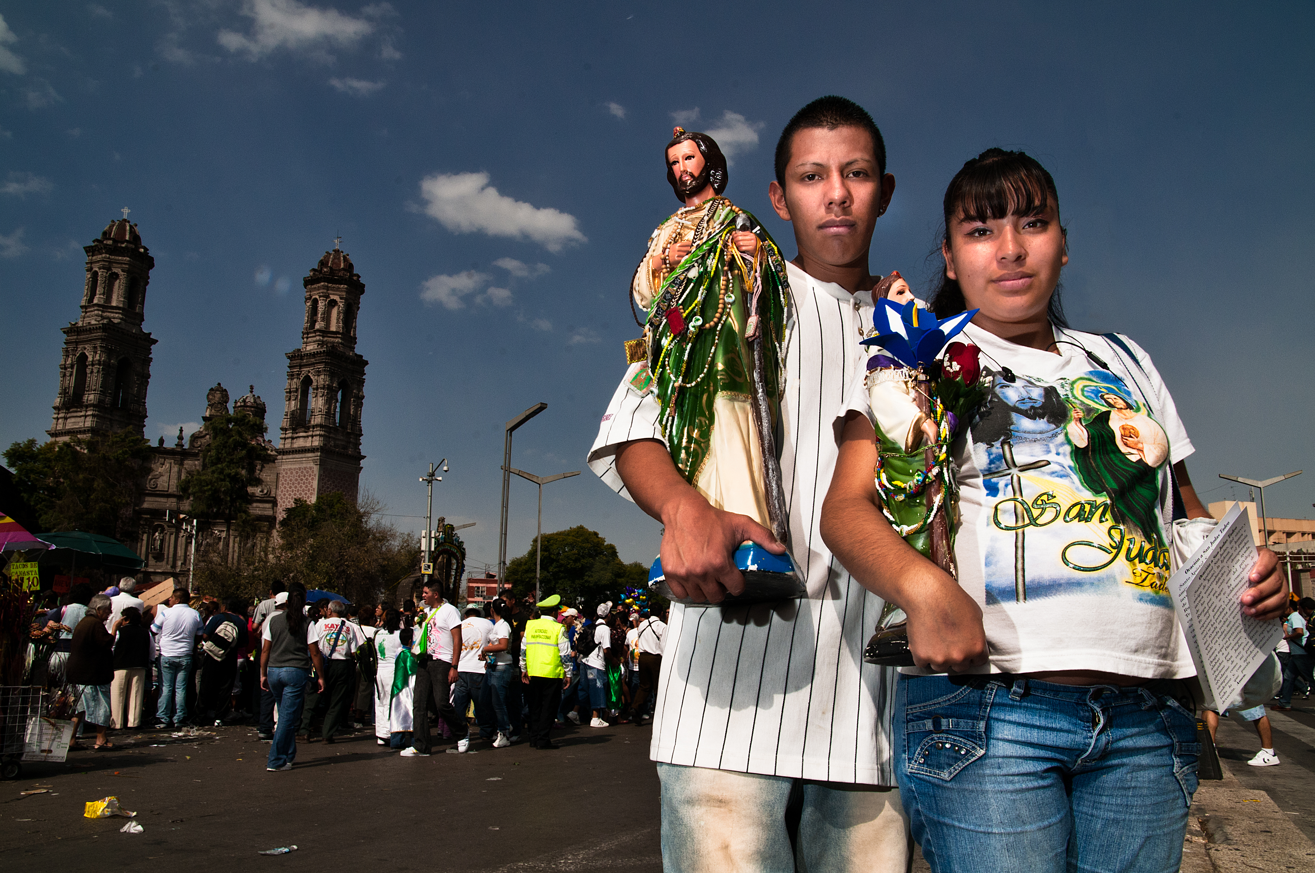 Al fondo, la iglesia de San Hipólito, a donde los creyentes llegan para adorar a Sn. Judas Tadeo (que no Iscariote, ese no es santo). --- Cada vez se hace más popular, nadie ofrece razones de por qué. Yo digo que es por la crisis, la falta de varo que lleva a la gente a poner su fé en la religión (ya que el Estado no da respuestas). Hoy, Beatriz Vivanco, sugirió que San Judas es el santo del trabajo, y la gente va a pedirle chamba. El santo del trabajo recobrando fuerza en el sexenio fallido del empleo.